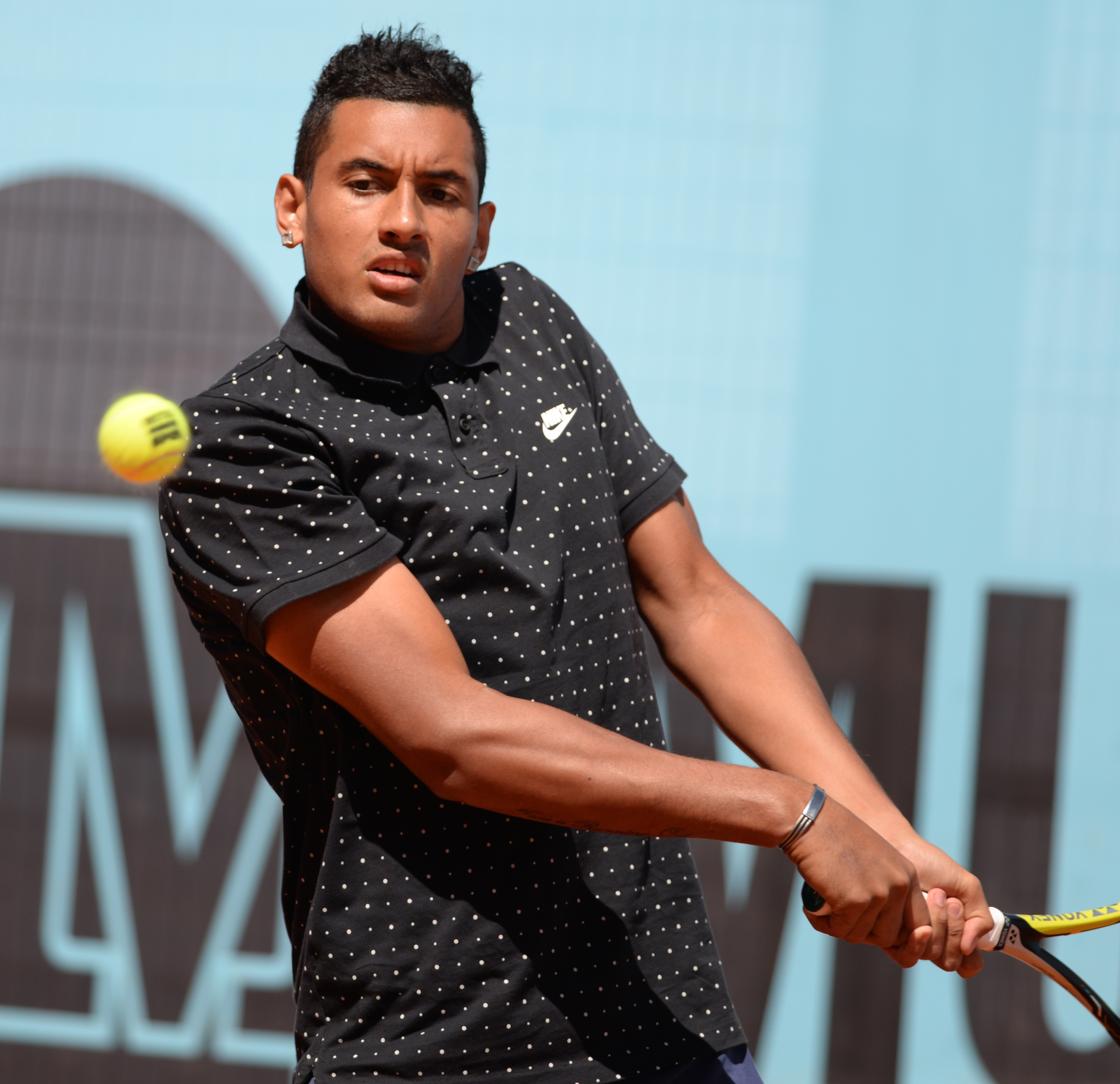 Nick Kyrgios